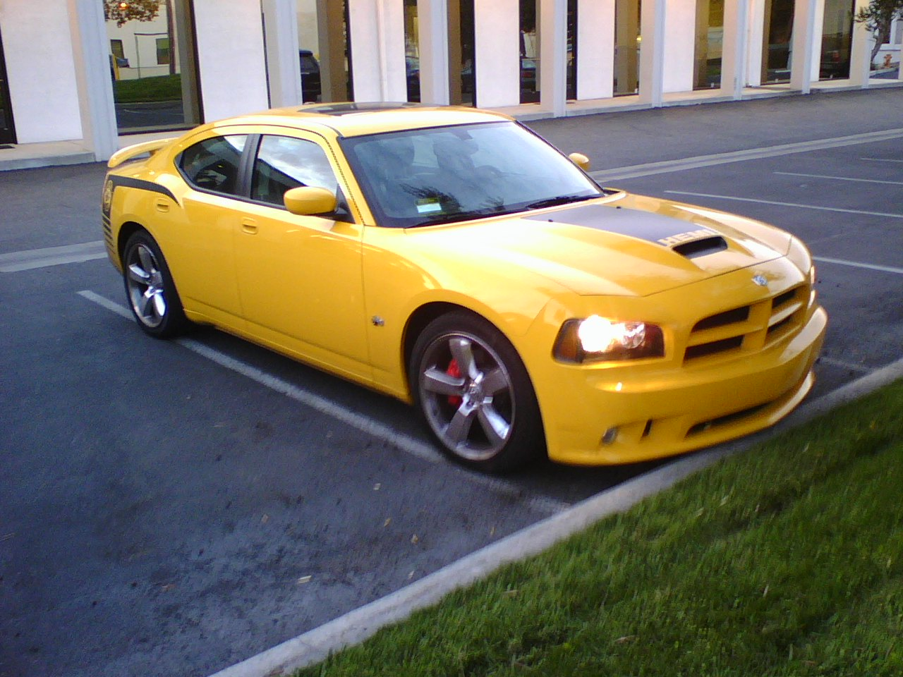 Dodge Charger SRT8 Super Bee